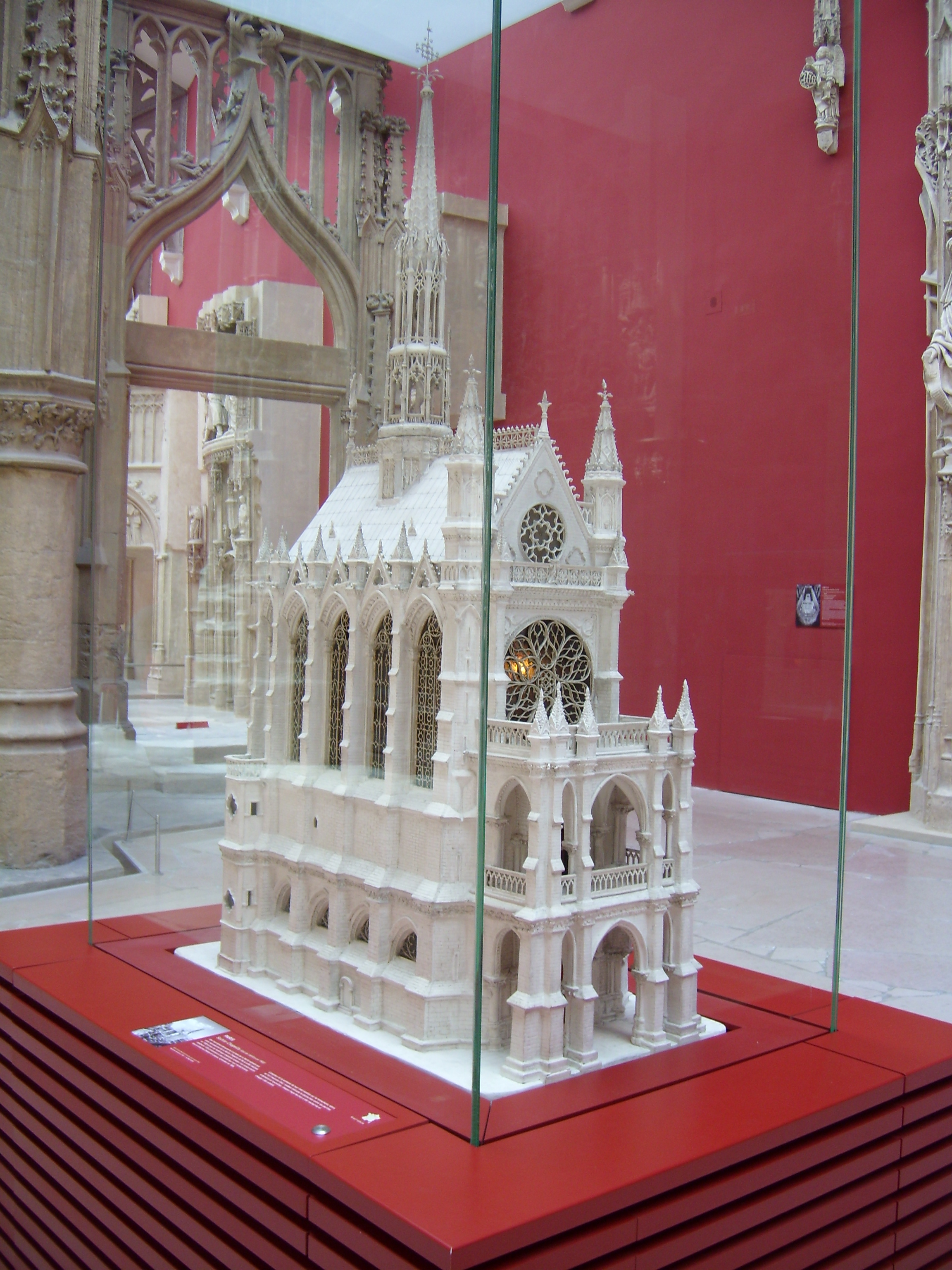 Galerie des Moulages, Musée des Monuments français, Paris. Maquette de la Sainte-Chapelle (XIIIe s., Paris, France), réalisée en 1900.